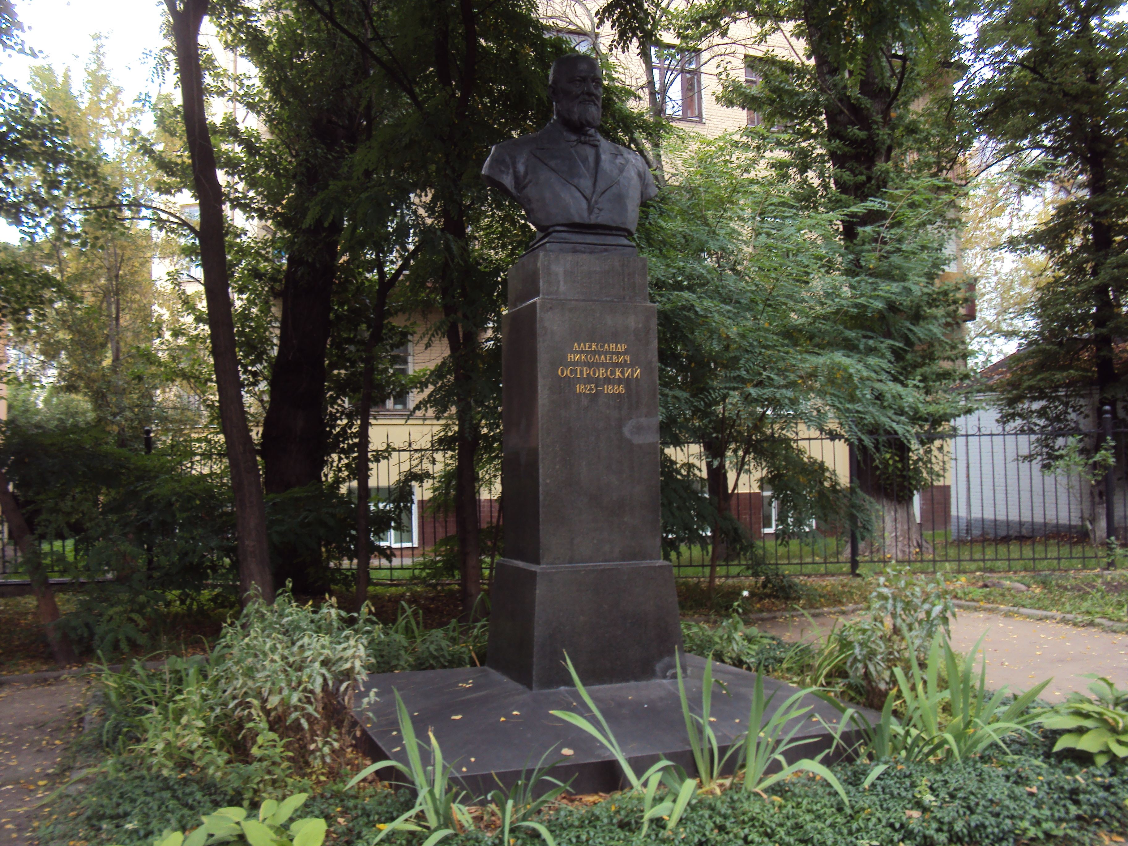 Бюст А.Н.Островского: Замоскворечье, Центральный округ, Москва